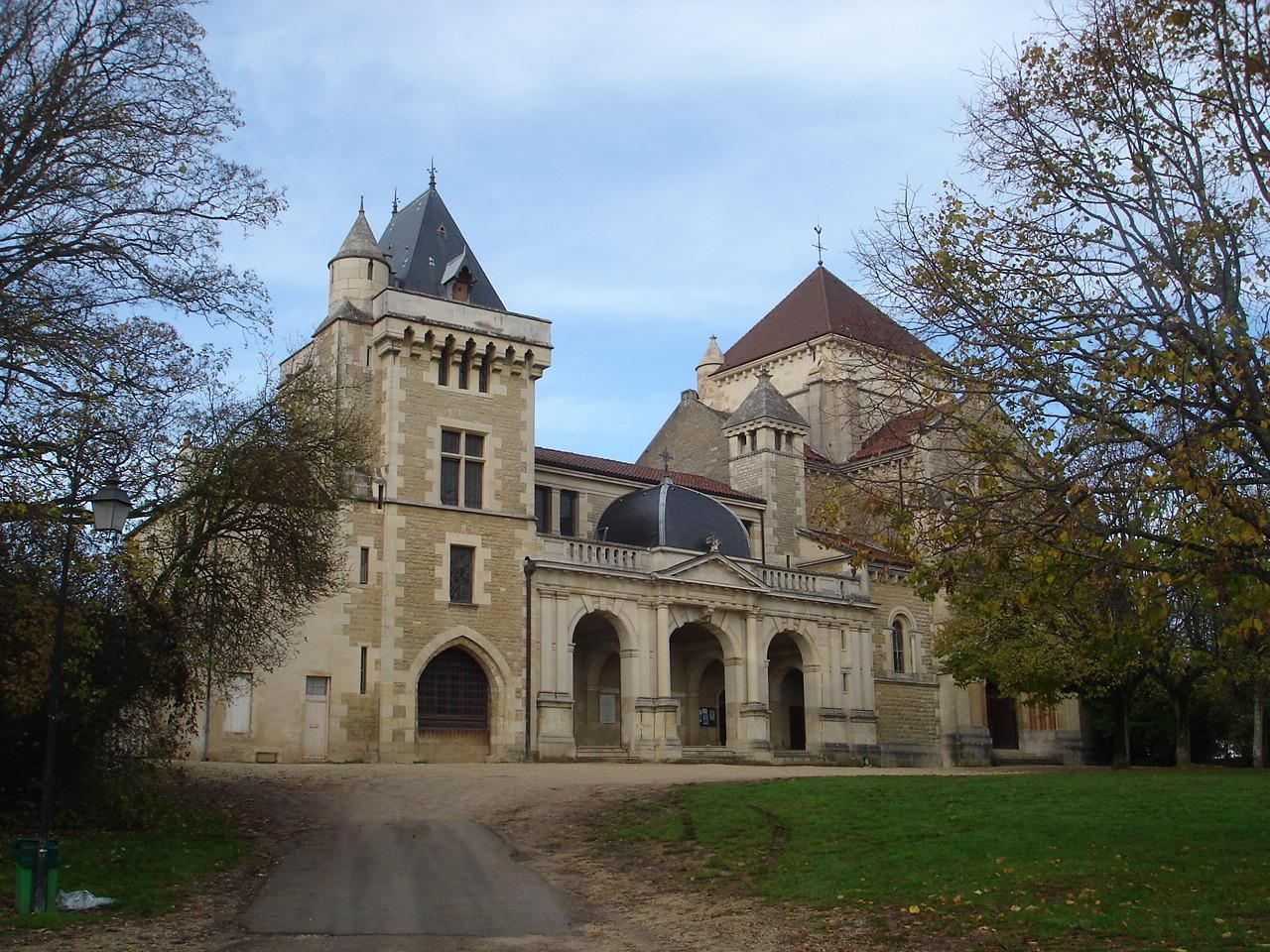 Village de la Cote d'Or prés de Dijon en France.